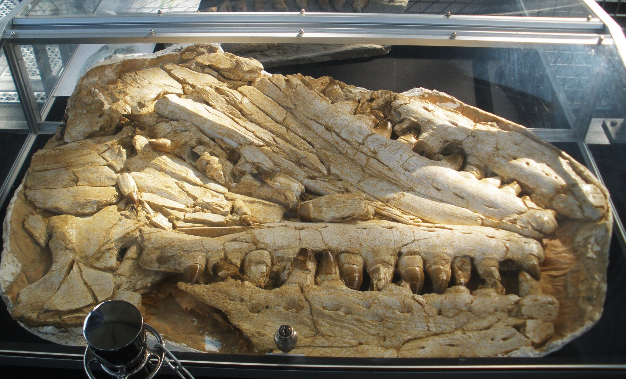 Fossil of Mosasaurus , an extinct lizard- Took the photo at De Groene Poort, Boxtel